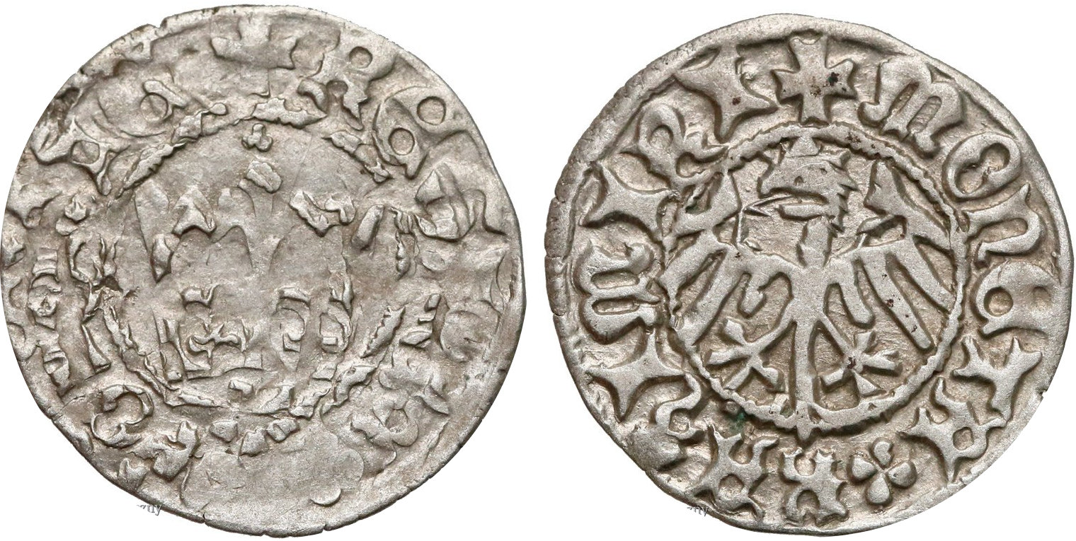 Półgrosz koronny Kazimierz Jagiellończyk - Poraj